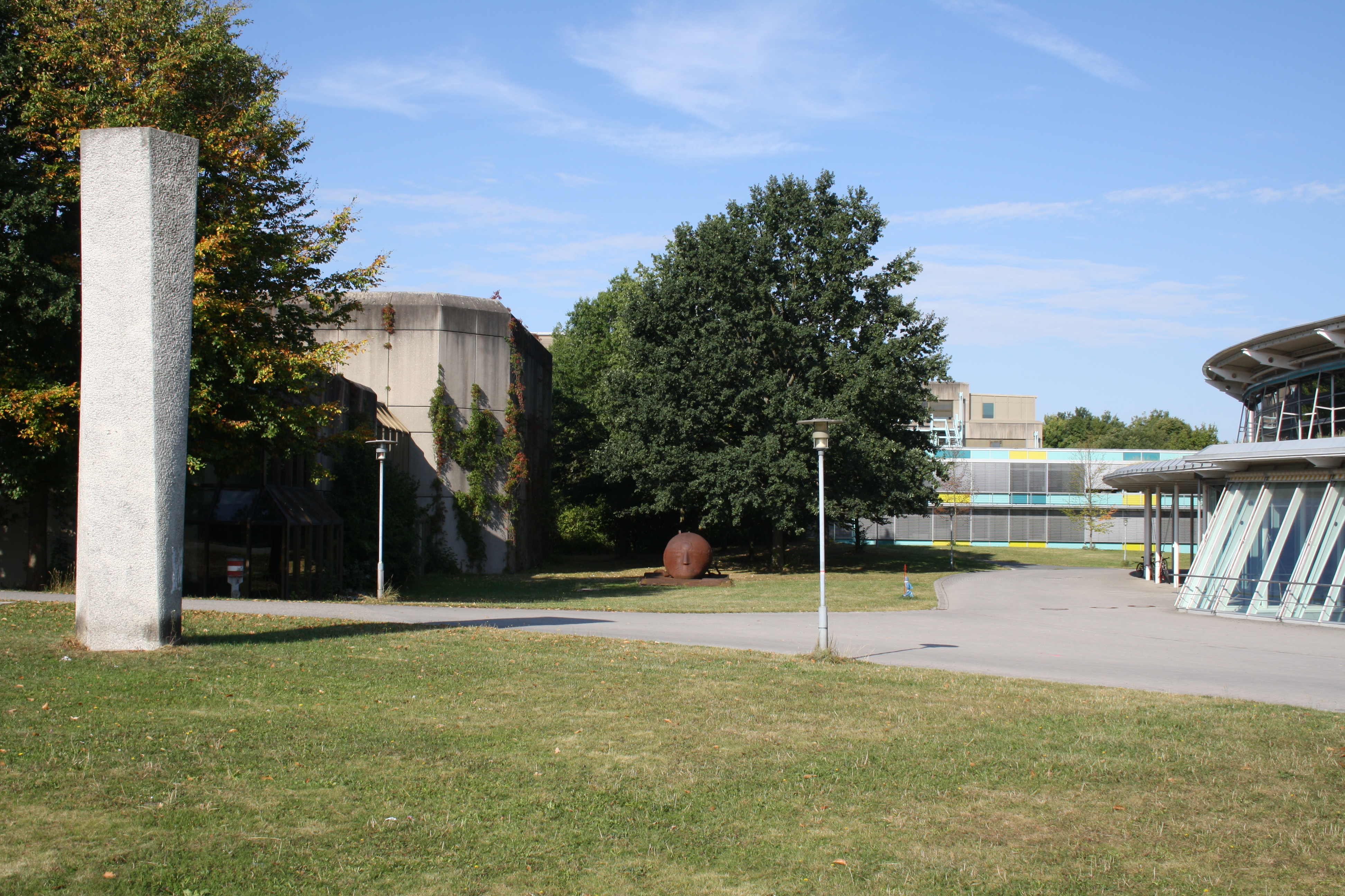 Stele und Rostkopf vor dem Audimax der Universität Bayreuth